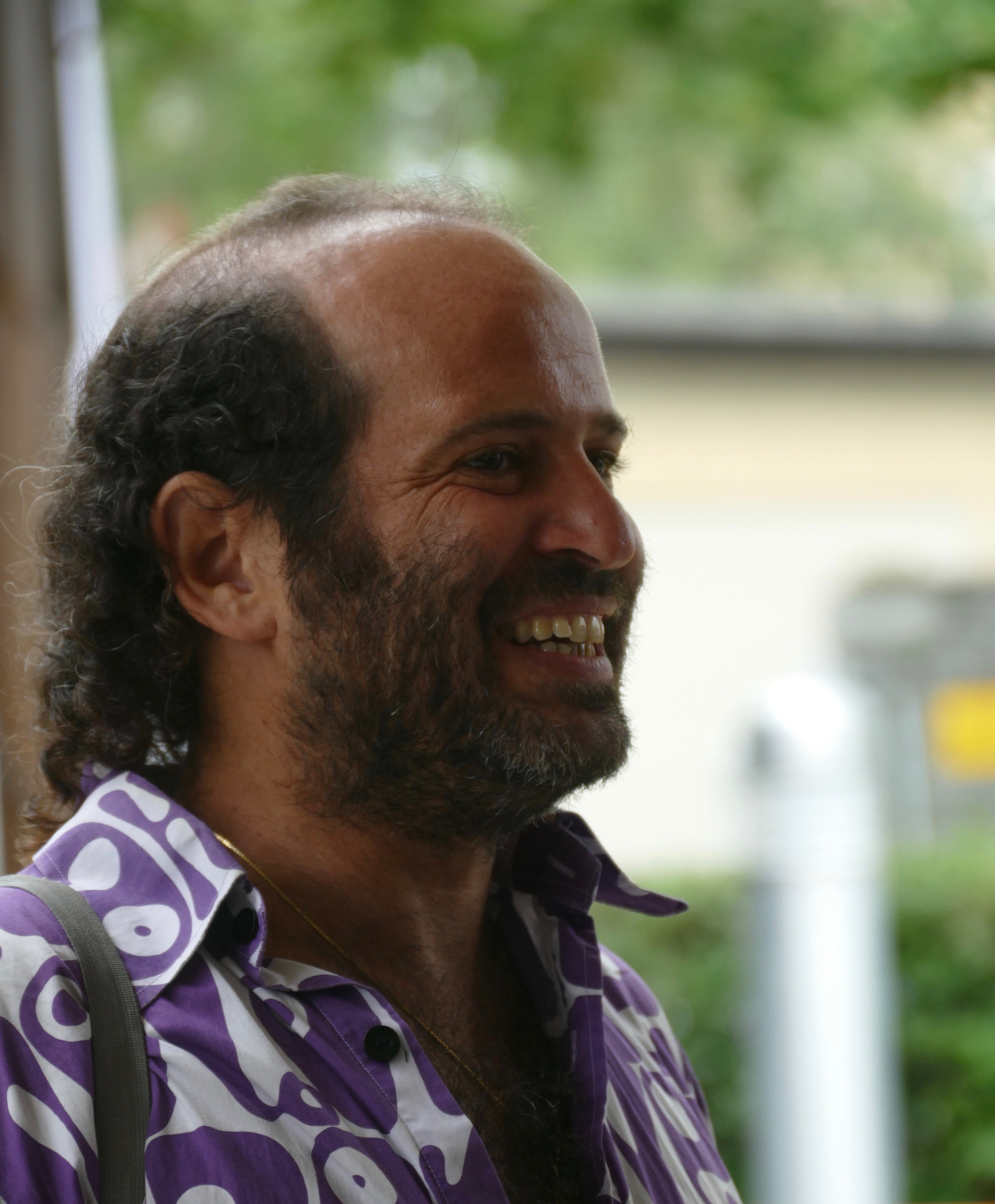 Tomer Gardi im Garten des ORF-Theaters beim Ingeborg Bachmann-Preis 2016